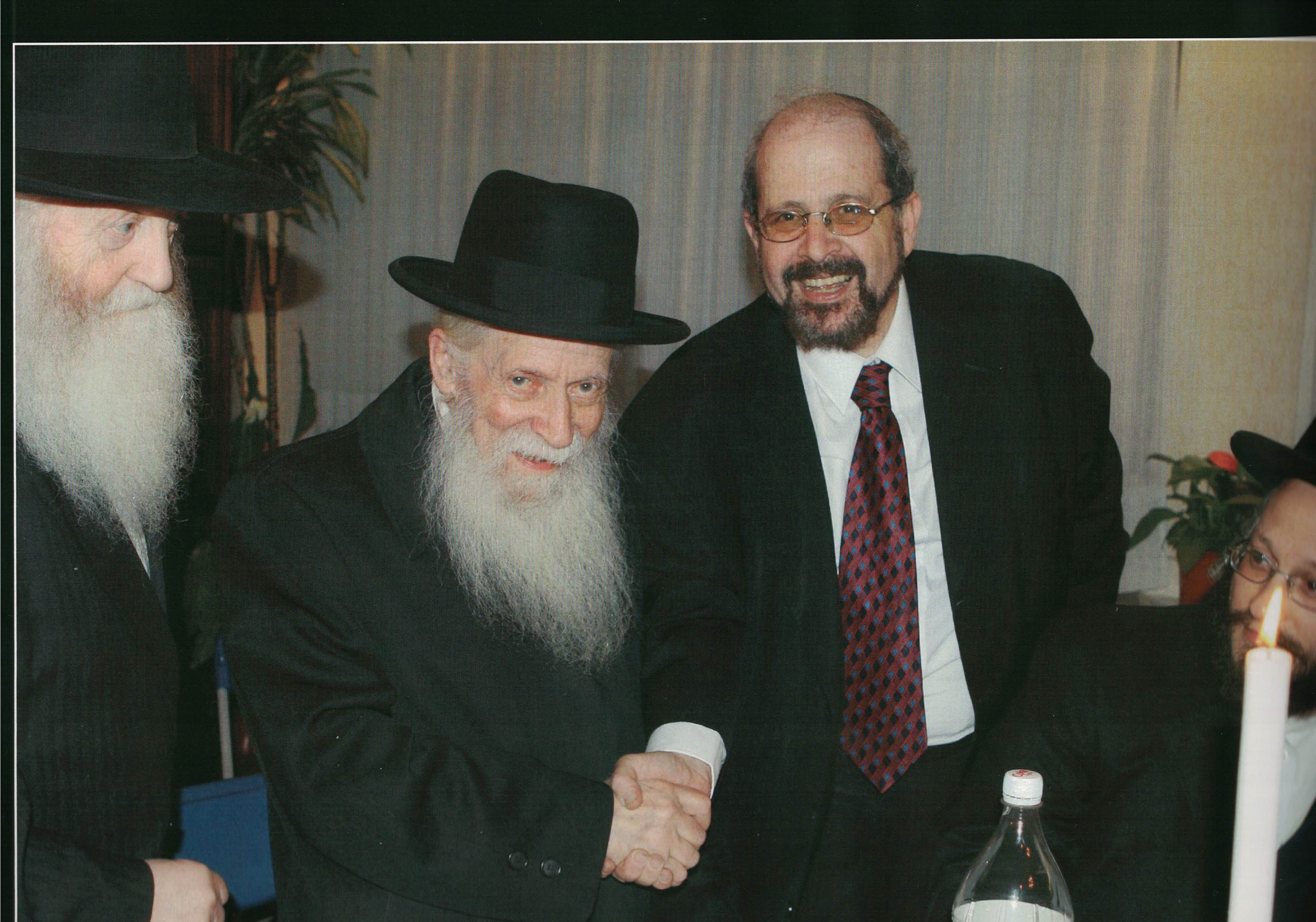 "Равин Шломо Залман Лехрер, председател на еврейската православна общност Machsike Hadas в Антверпен,поздравява британският равин Арон Даум по повод годежа на втората му дъщеря Яел със зет му Джоел. Равин Шломо Залман Лехрер е един от малкото оцелели от известния Хасидски град Зенс ,през ада на Холокоста. Той е посветил целия си живот на паметта на този известен град както и на основателя на Хасидската династия Зенс,равин Хаим Халберстам (1793-1876). "